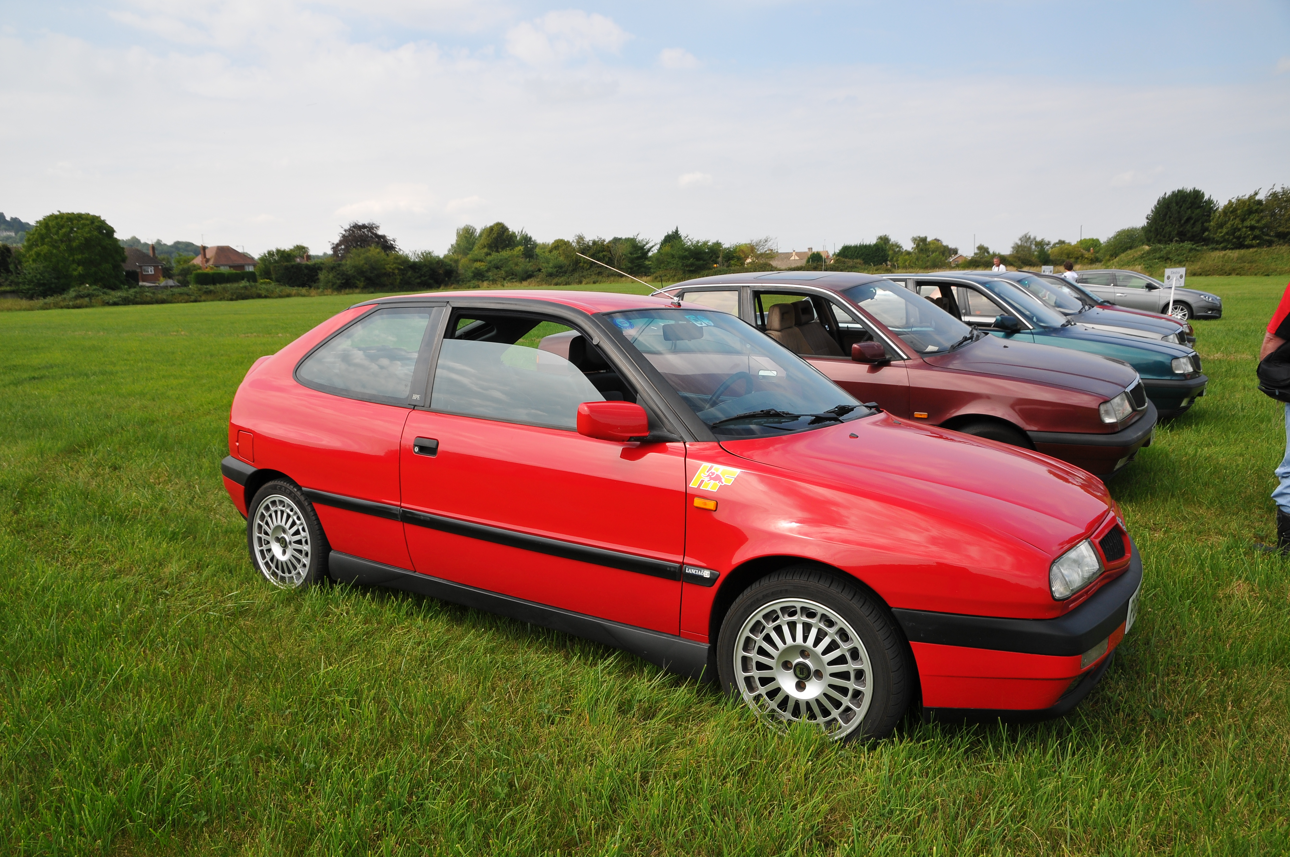 Lancia Motor Club AGM 2011